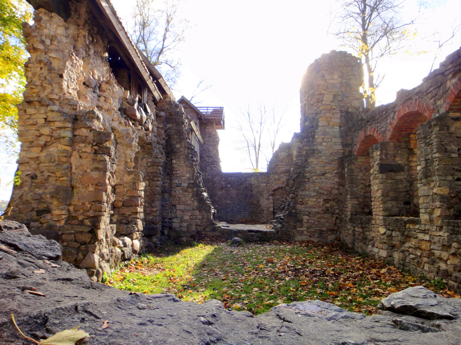 Lielvārde (Lennewaden) castle ruins